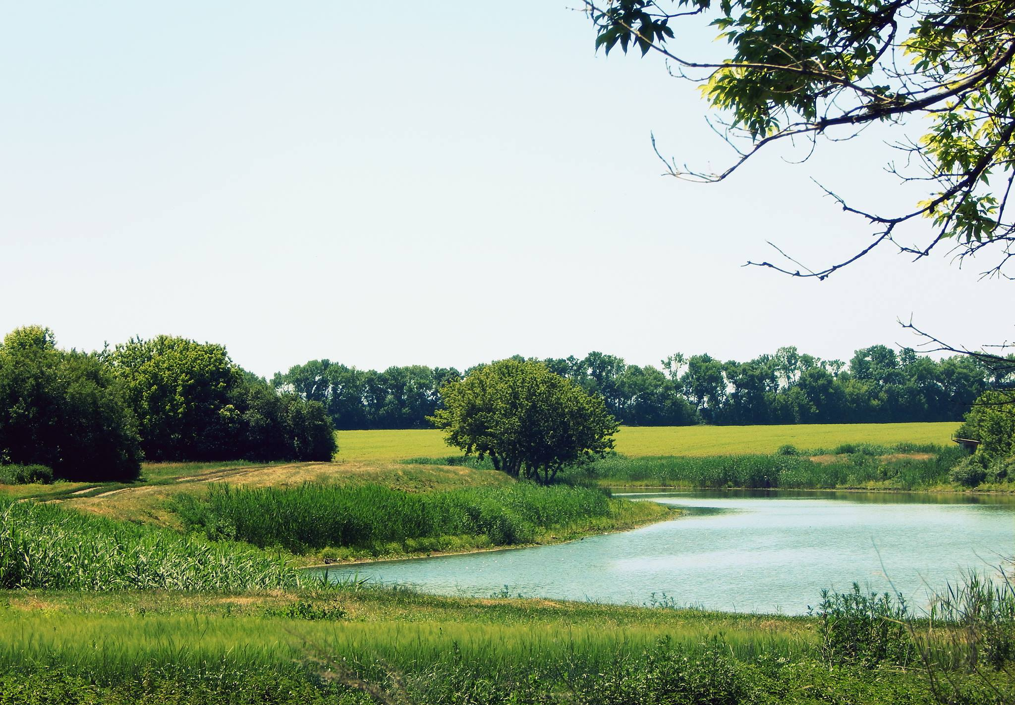 фото люб'язно надано Е. Крутько